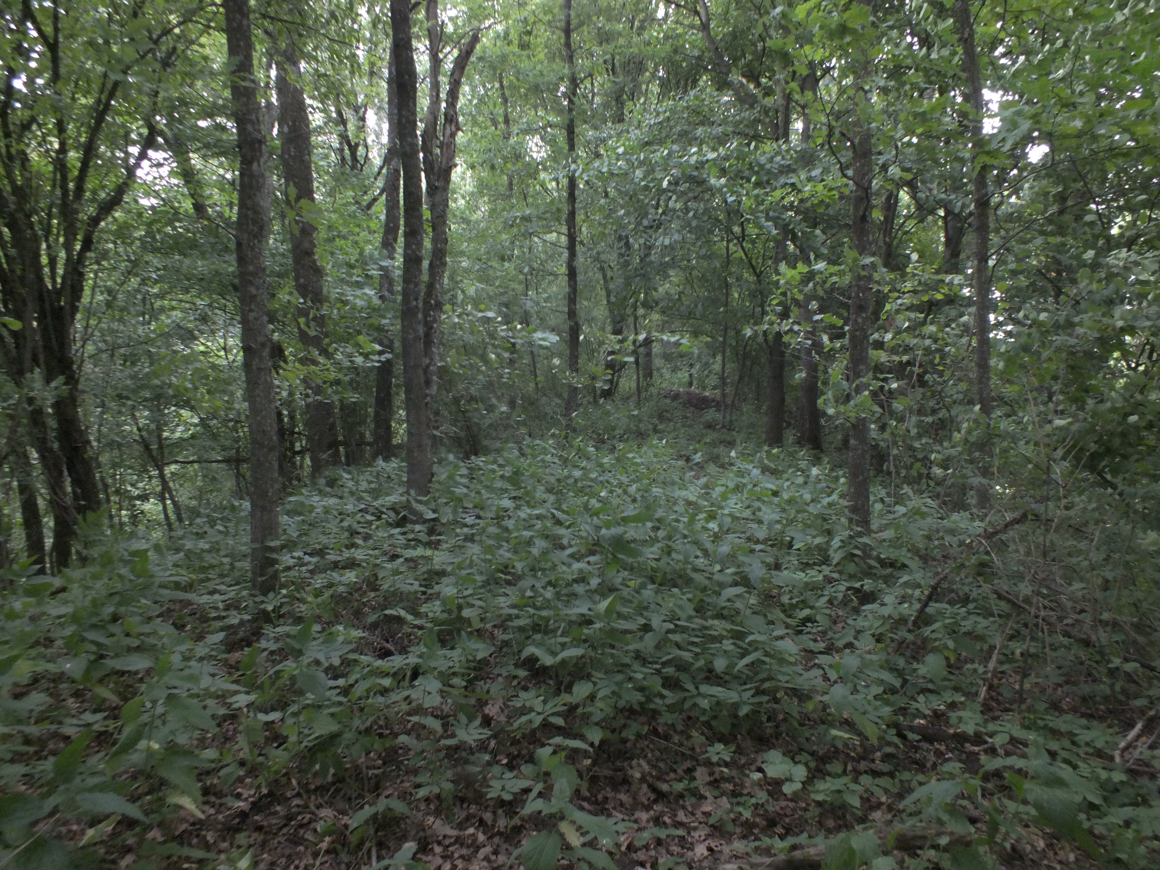 Ant Barkūnų ozo